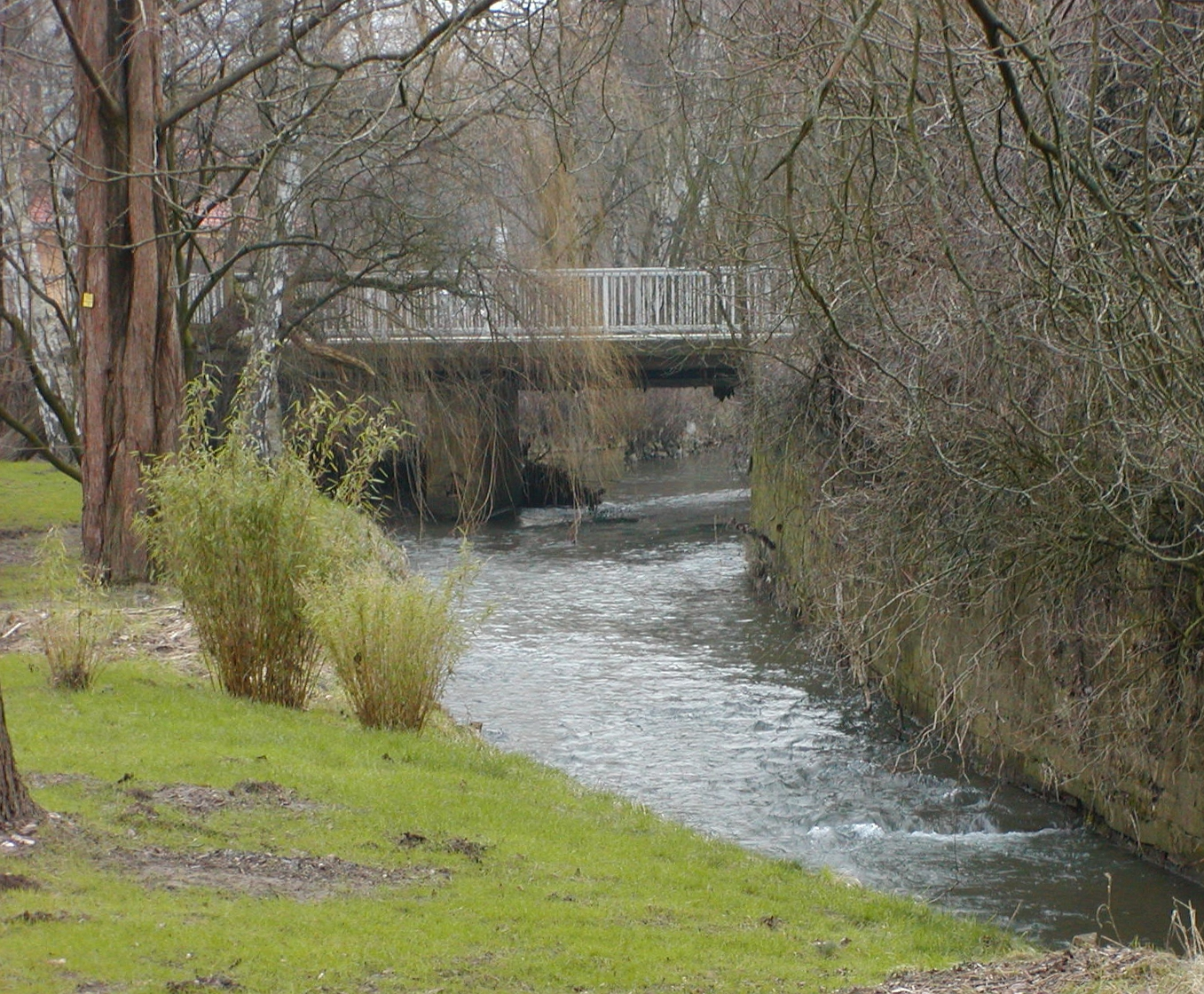 Aue im Kurpark Bad Eilsen